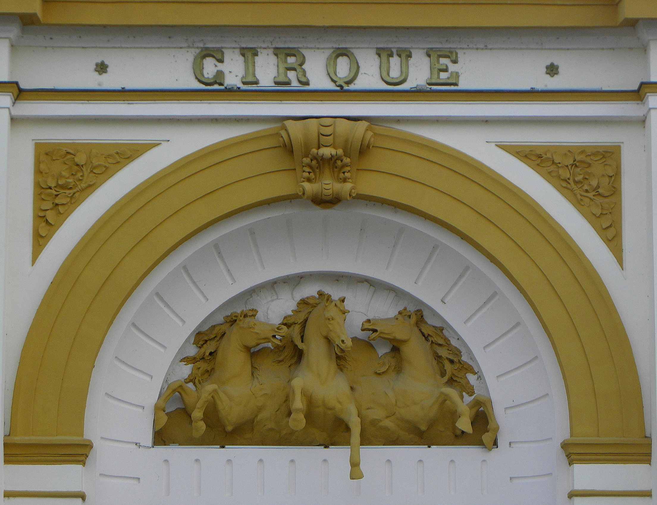 Cirque de Châlons-en-Champagne (51).